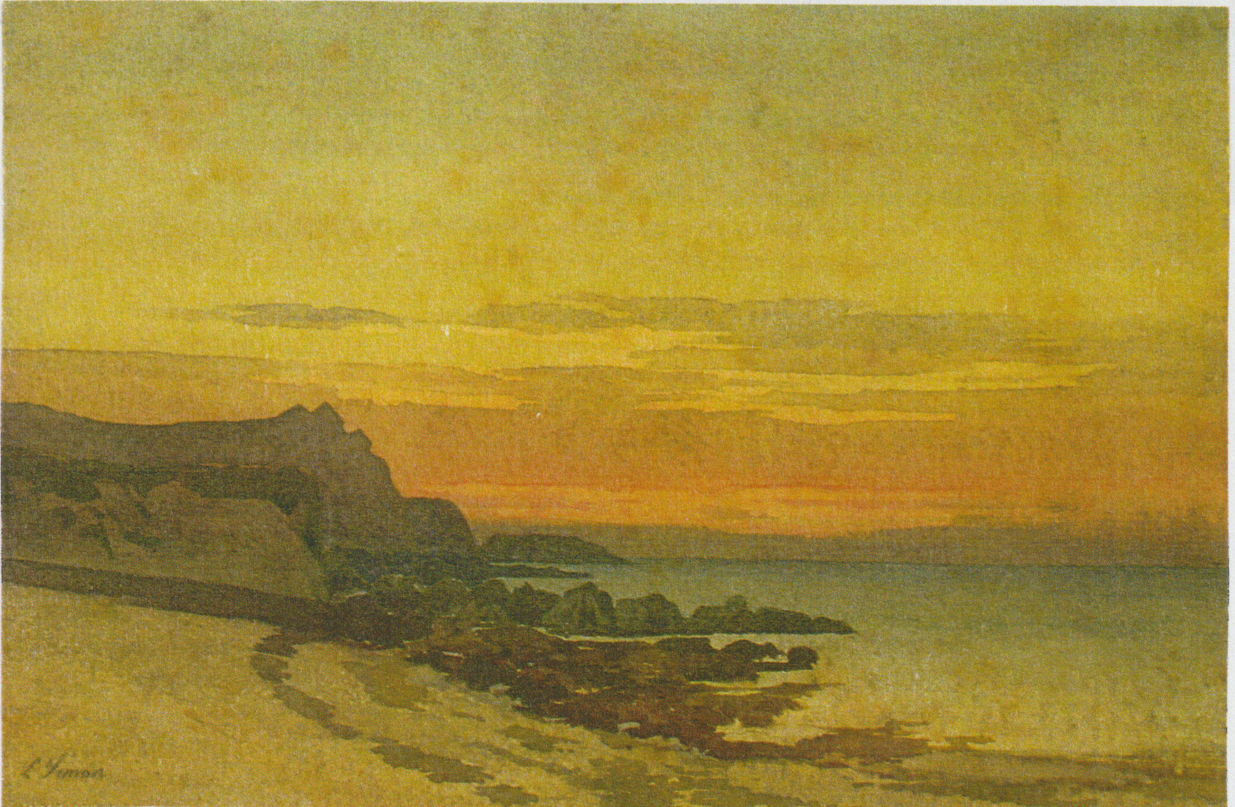 Jean-Baptiste Léon SIMON - Paysage de Guernesey